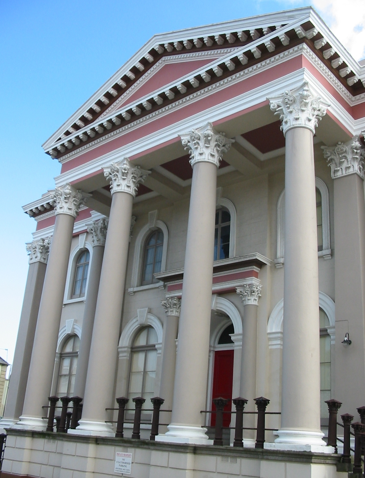 Nrf: Saint Hélyi, Jèrri